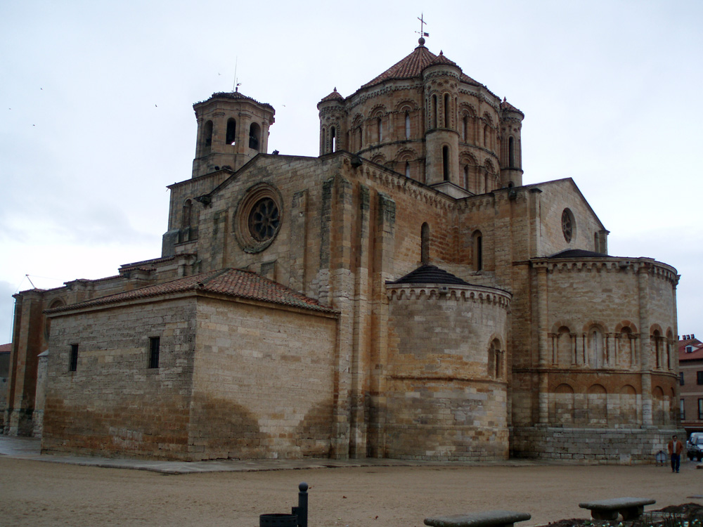 Colegiata de Santa María la Mayor, en Toro (Zamora)